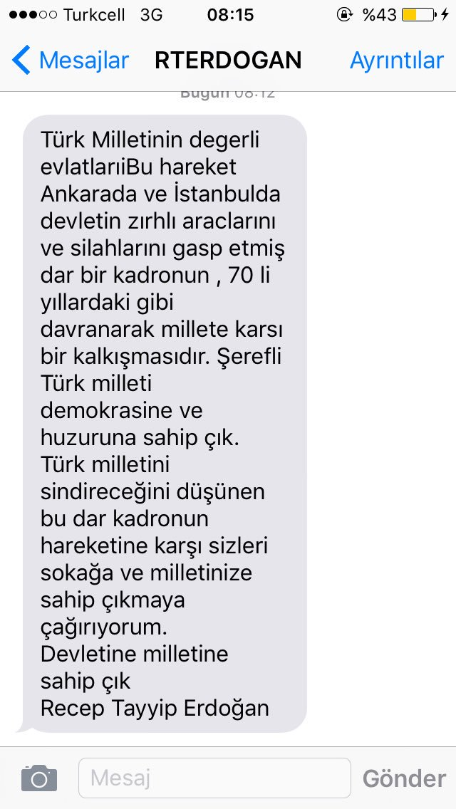 Fethullahçı Terör Örgütü (FETÖ/PDY) mensuplarıncan bulunulan 15 Temmuz 2016 Türkiye askeri darbe girişimi sırasında Başkomutanlık yetkisini kullanan Türkiye Cumhurbaşkanı Recep Tayyip Erdoğan tarafından Türkiye Cumhuriyeti vatandaşlarına Türkiye'deki operatörler aracılığıyla gönderilen SMS.